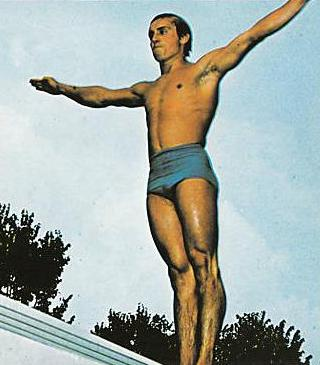 Il tuffatore italiano Giorgio Cagnotto